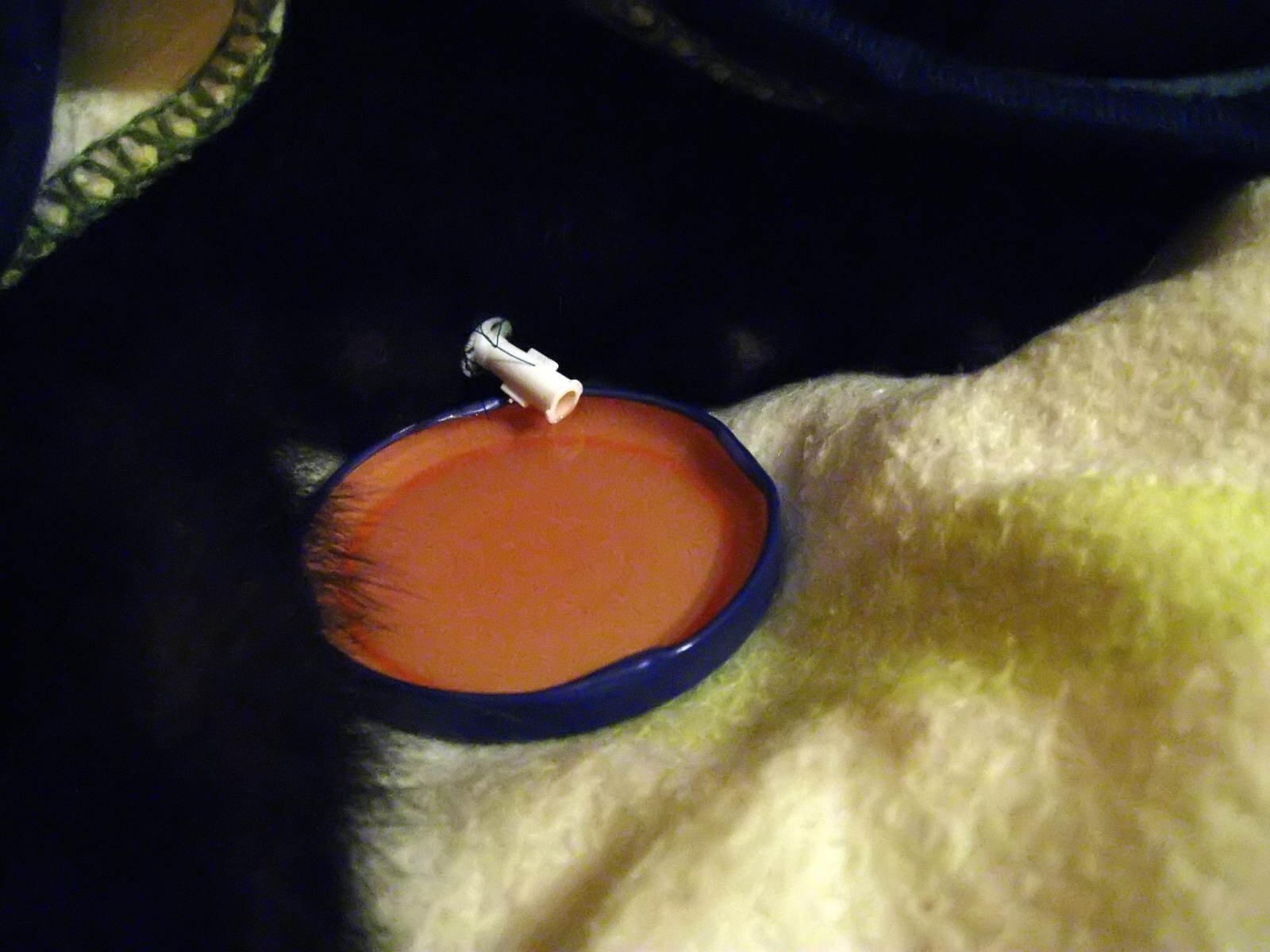 Cewnik założony kotu